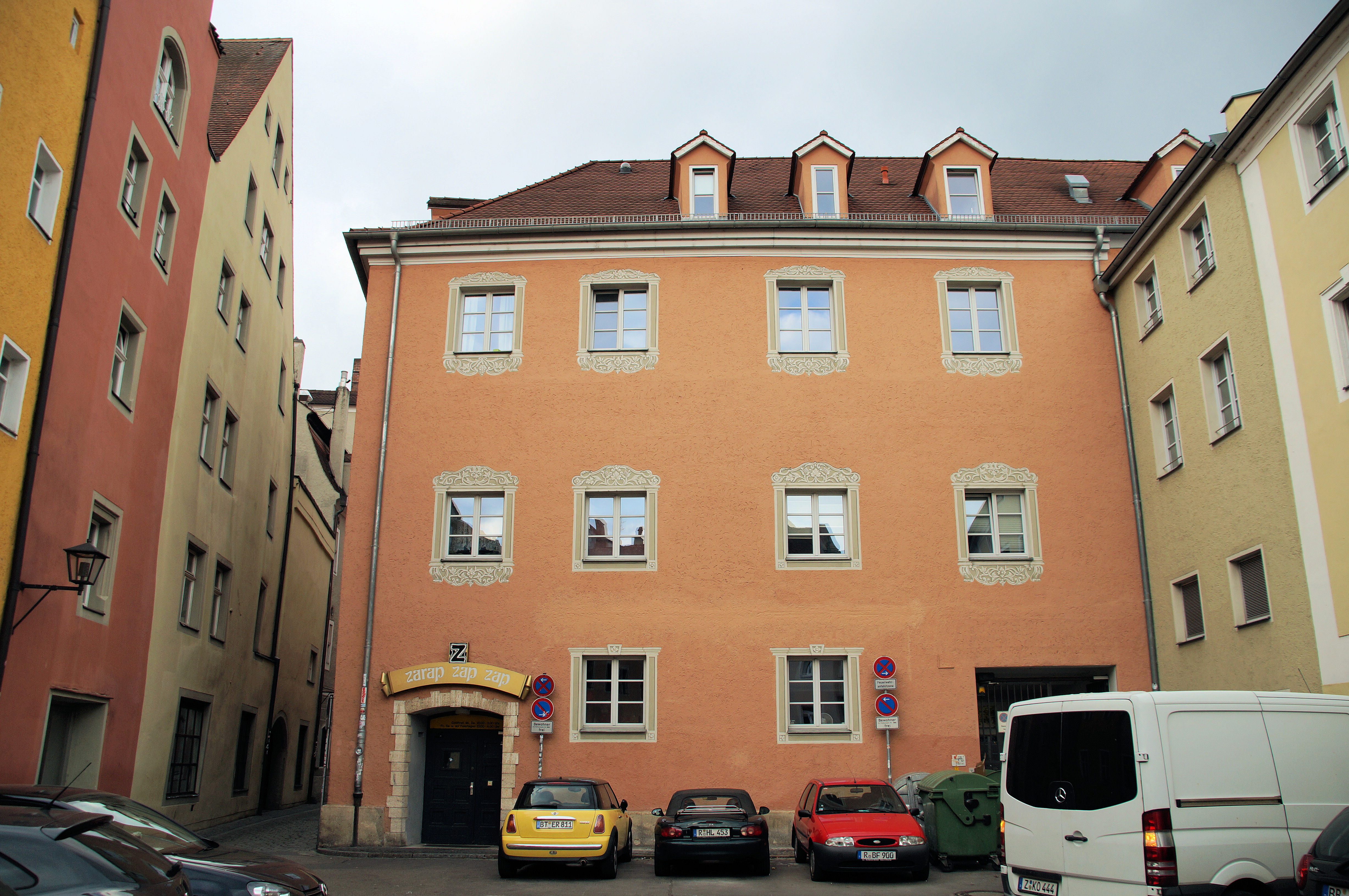 Ehem. Augustinerkloster, heute Gaststätte Augustiner, mehrflügeliger und dreigeschossiger Walmdachbau, um 1700, Umbau nach Abbruch der Kirche 1838, im Nordflügel ehem. Refektorium, um 1731 von Egid Quirin Asam stuckiert This is a photograph of an architectural monument.